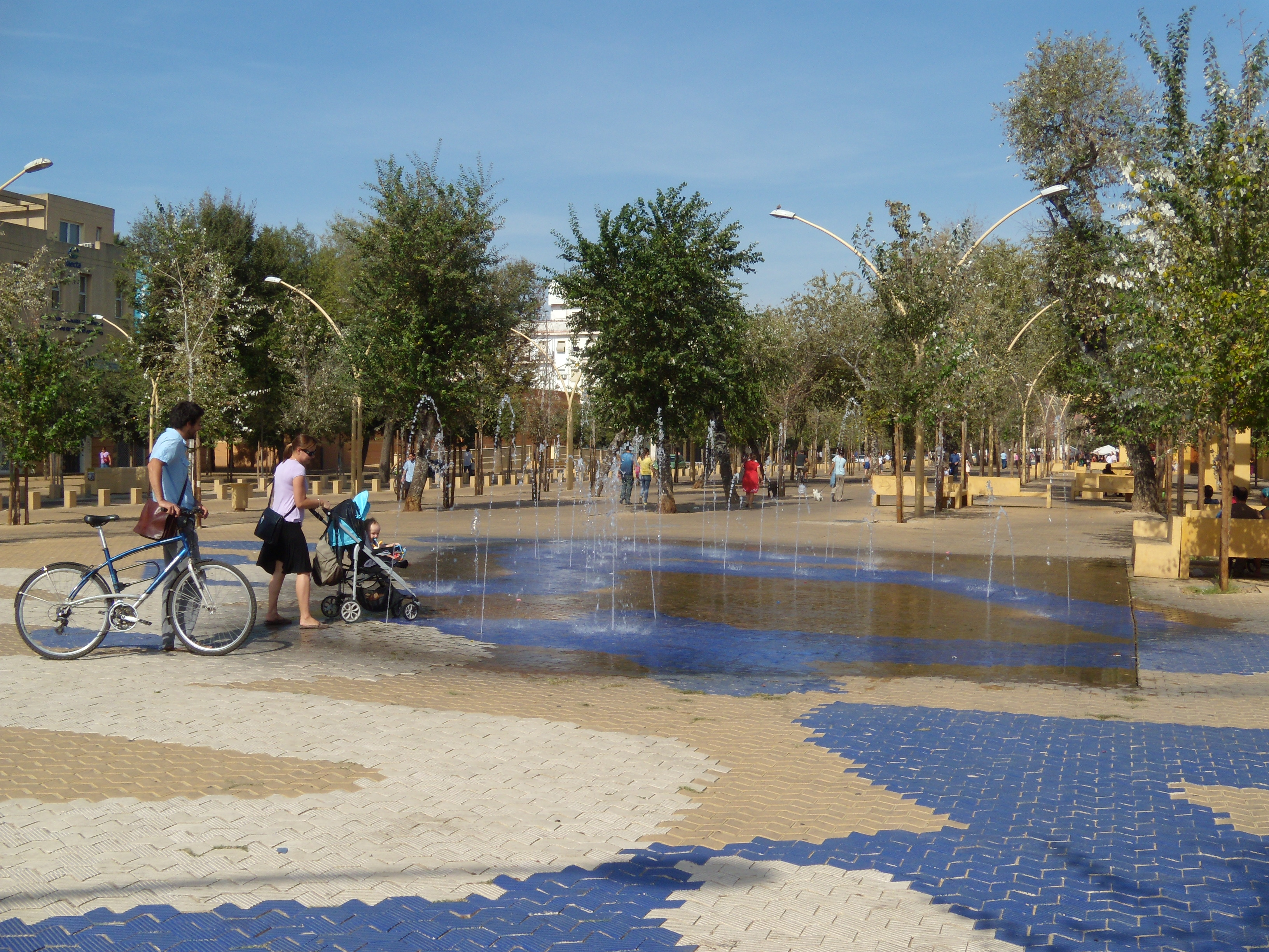 Une fontaine de la Alameda de Hércules, place de Séville (Espagne)